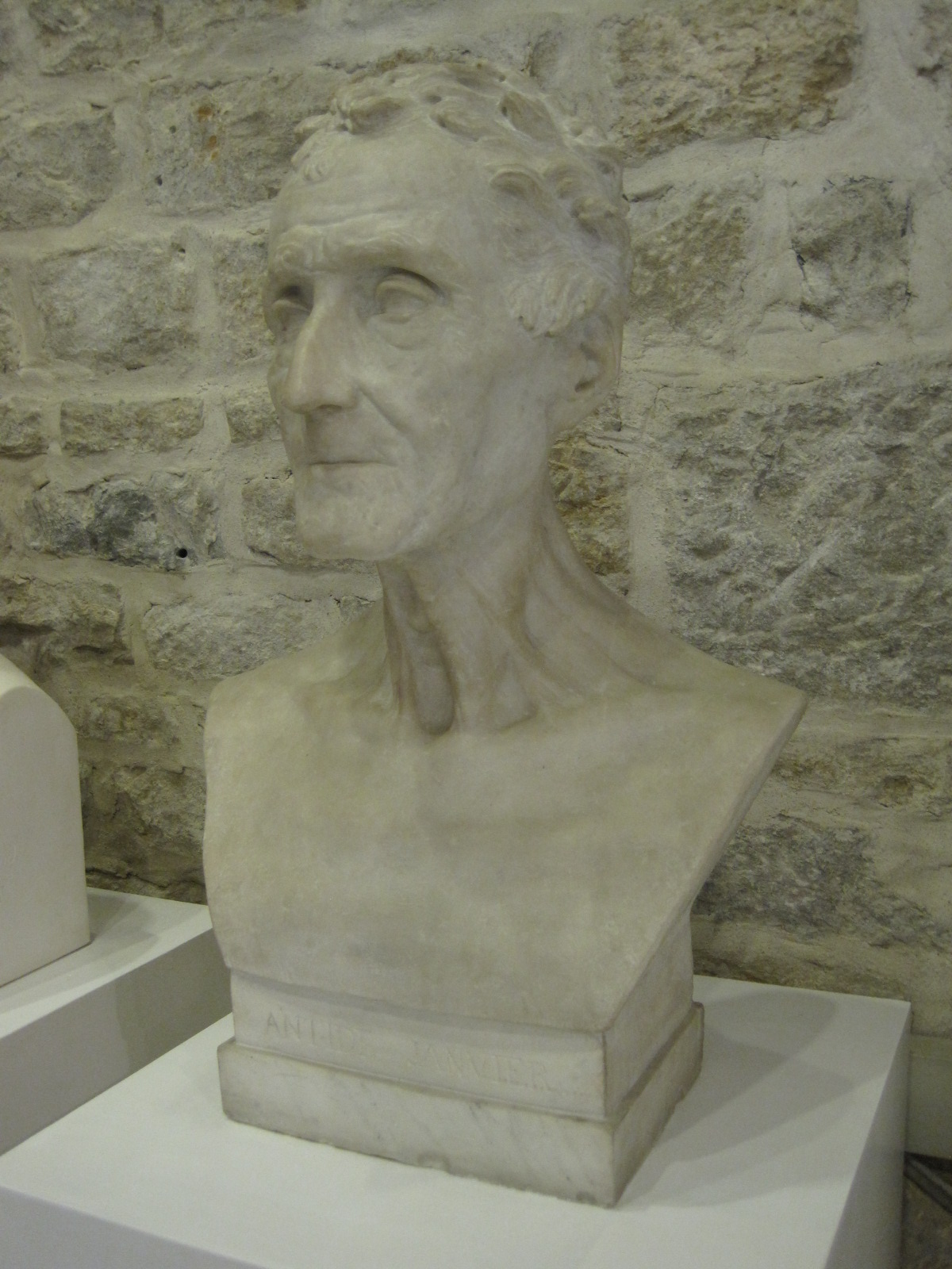 Musée des Beaux-Arts de Lons-le-Saunier - Buste d'Antide Janvier par Victor Huguenin en 1836